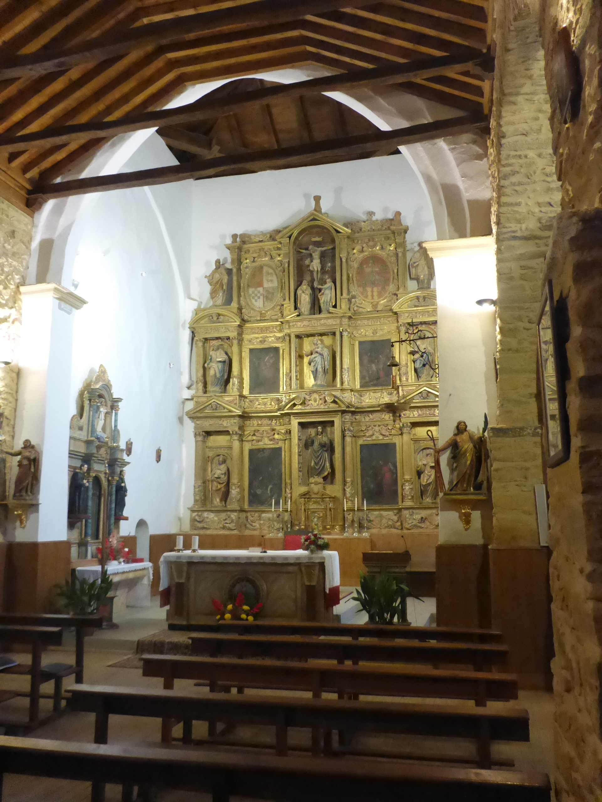 Iglesia de San Salvador en Fuente Encalada